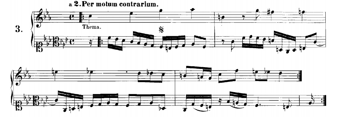 Del compositor Johann Sebastian Bach, el "a 2.Per motum contrarium" de su obra "La Ofrenda Musical". Extraido de la edición de 1885 realizada por Alfred Dörffel (1821–1905), por lo que es de dominio público.